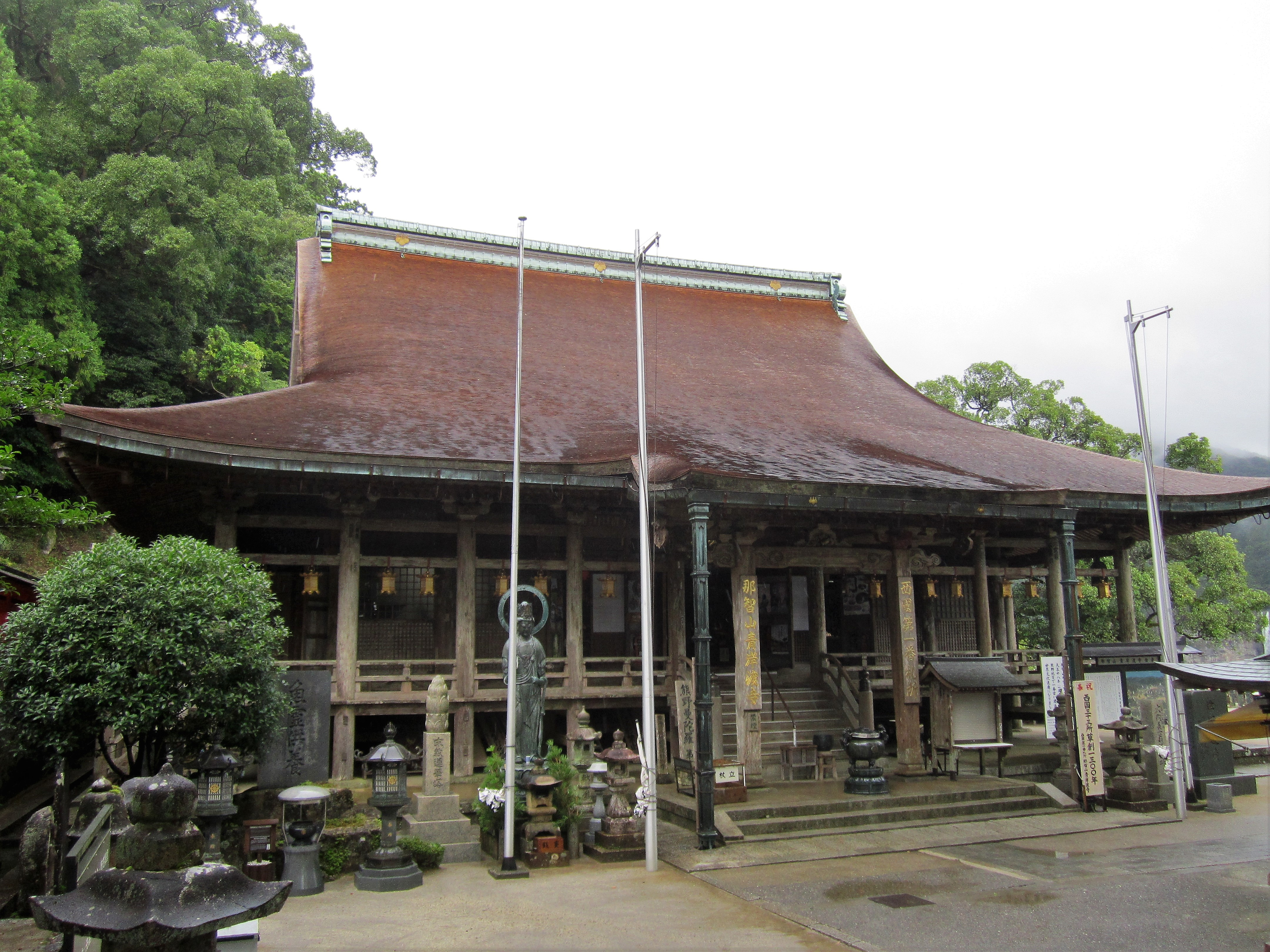 青岸渡寺 本堂